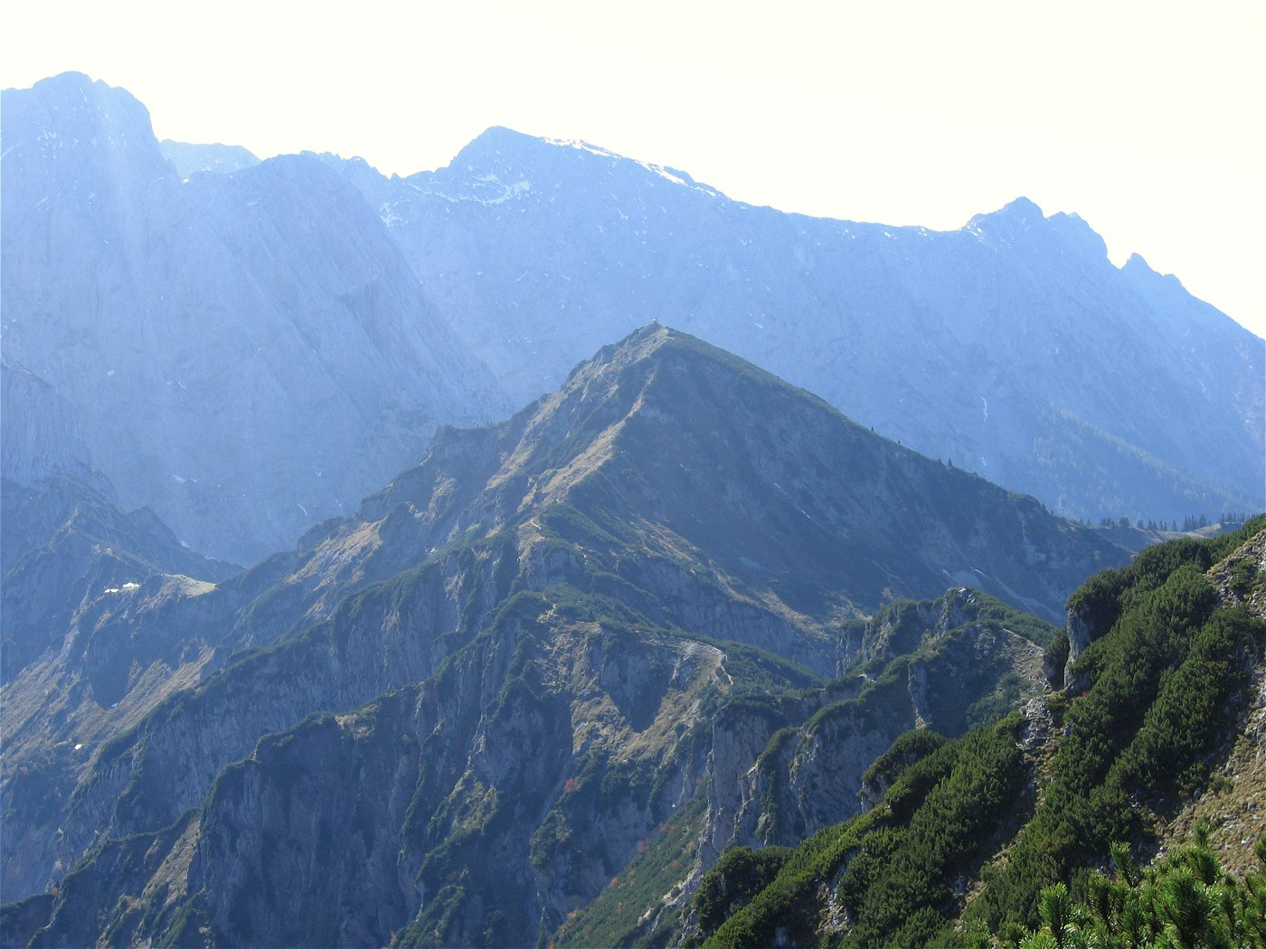 Stripsenkopf, dahinter das Sonneck